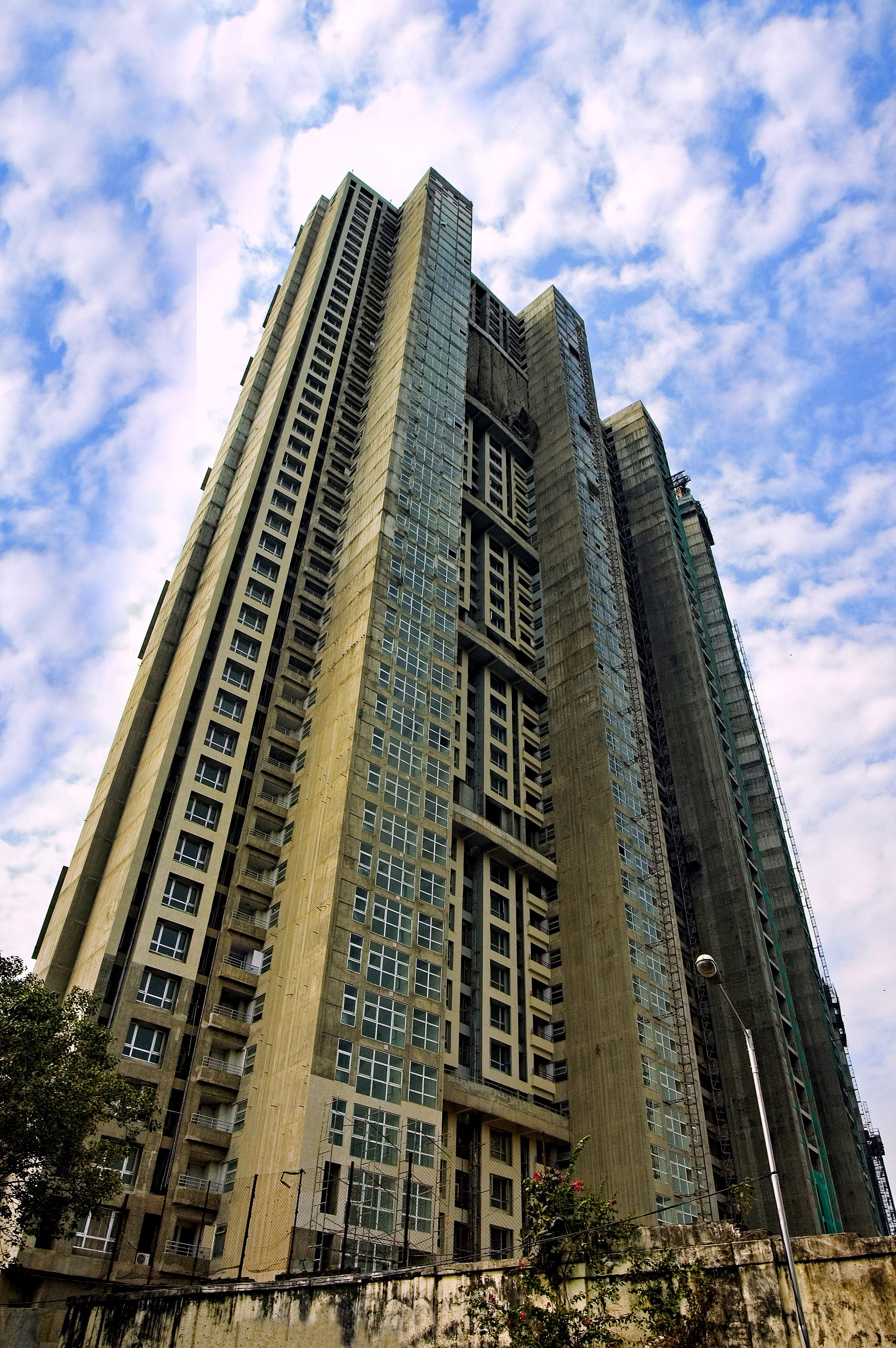 Planet Godrej, Mumbai, India.